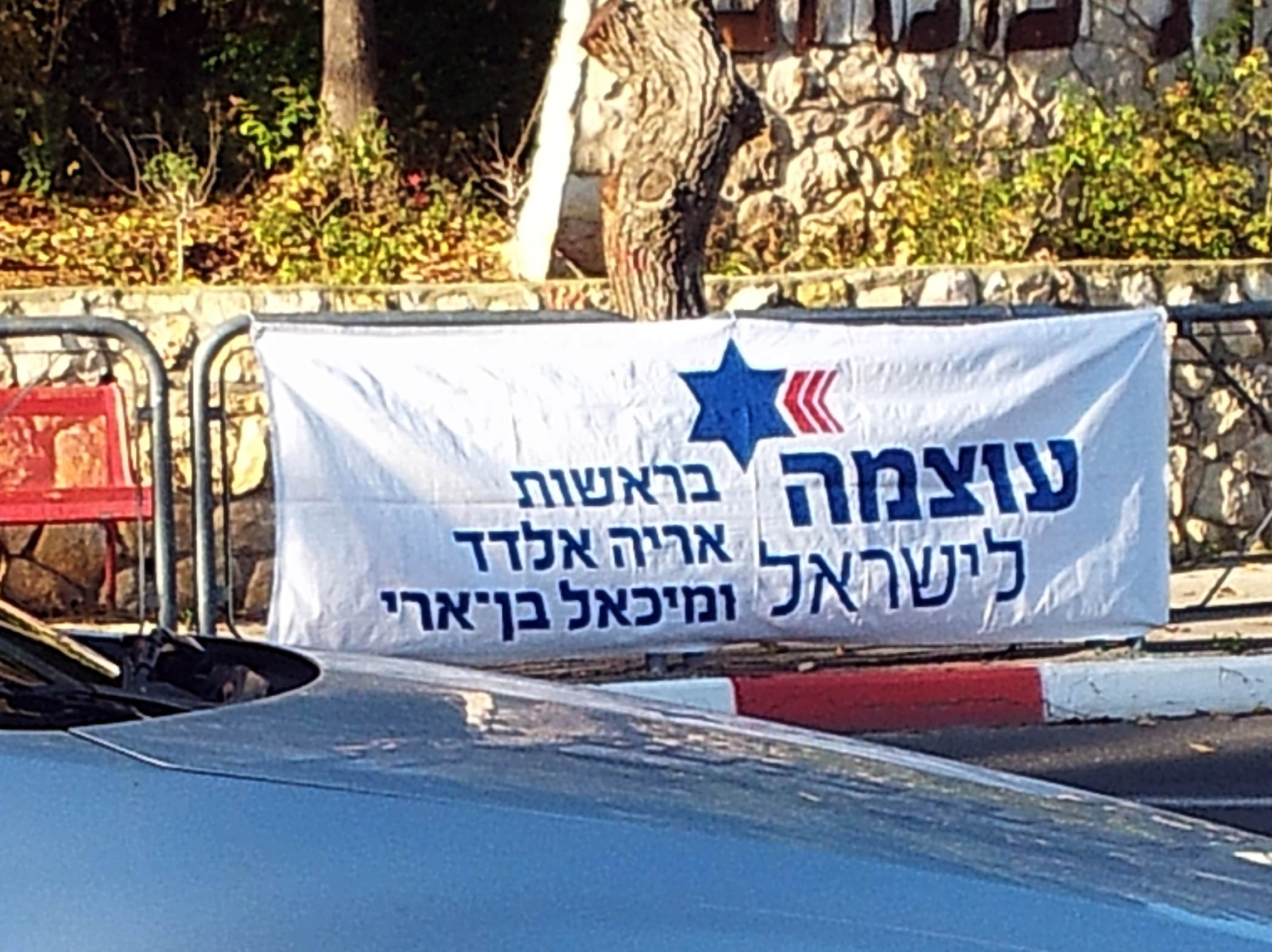 Israel Ozma LeIsrael political party poster, Jerusalem. Israel Elections 2012